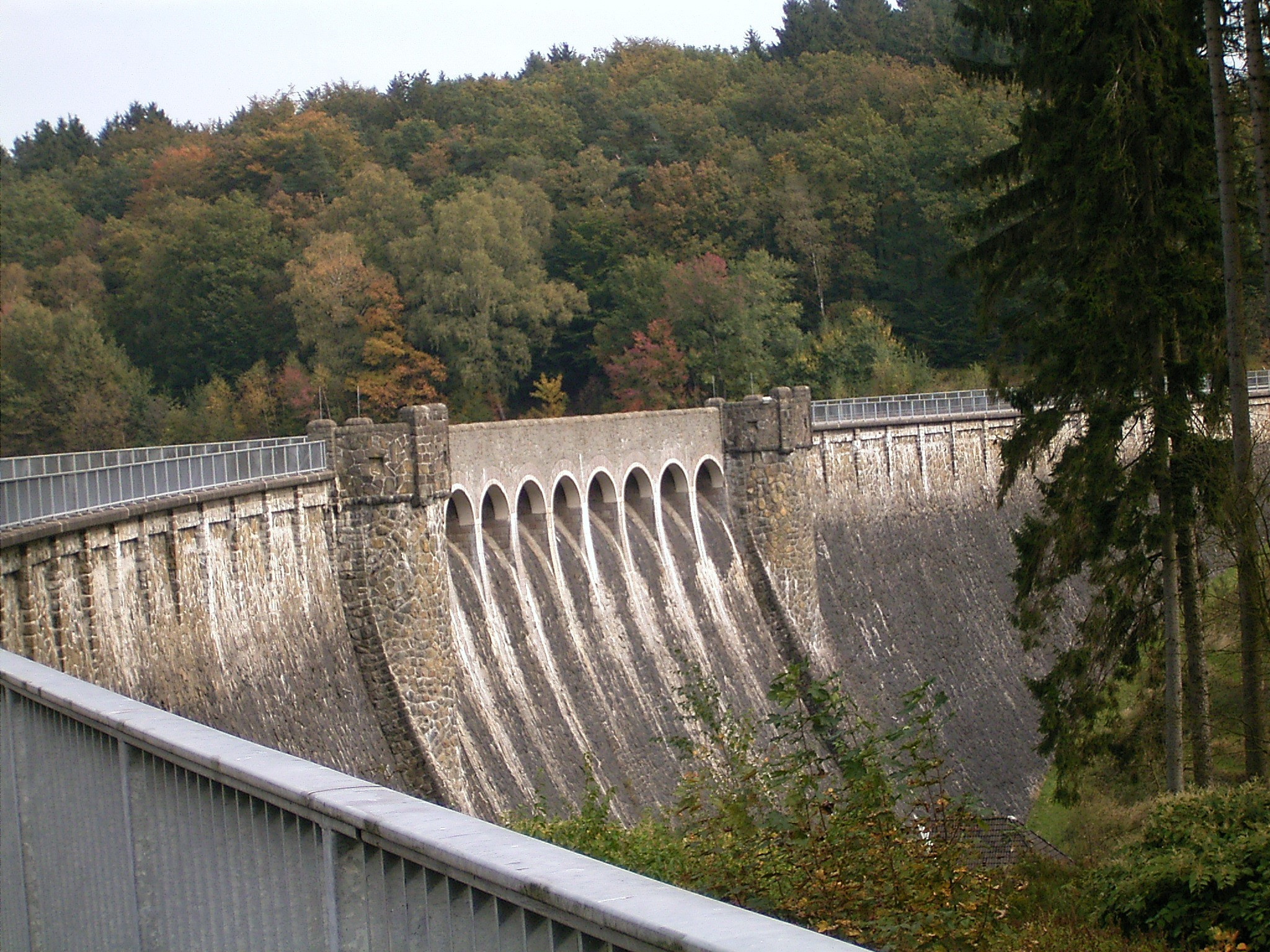 Kerspetalsperre